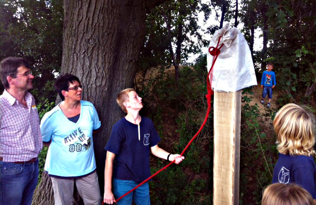 Enthüllung der Hinweistafel der Friedenseiche in Evestorf, Gemeinde Wennigsen (Deister).